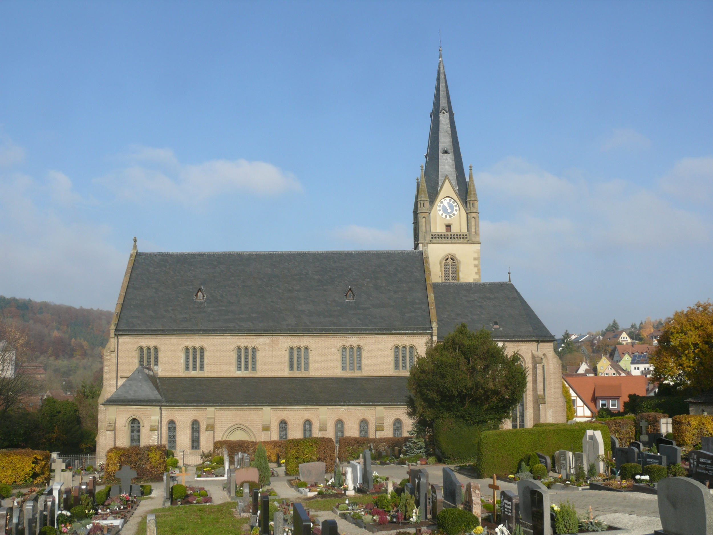 Kirche Sankt Margareta in Laudenbach